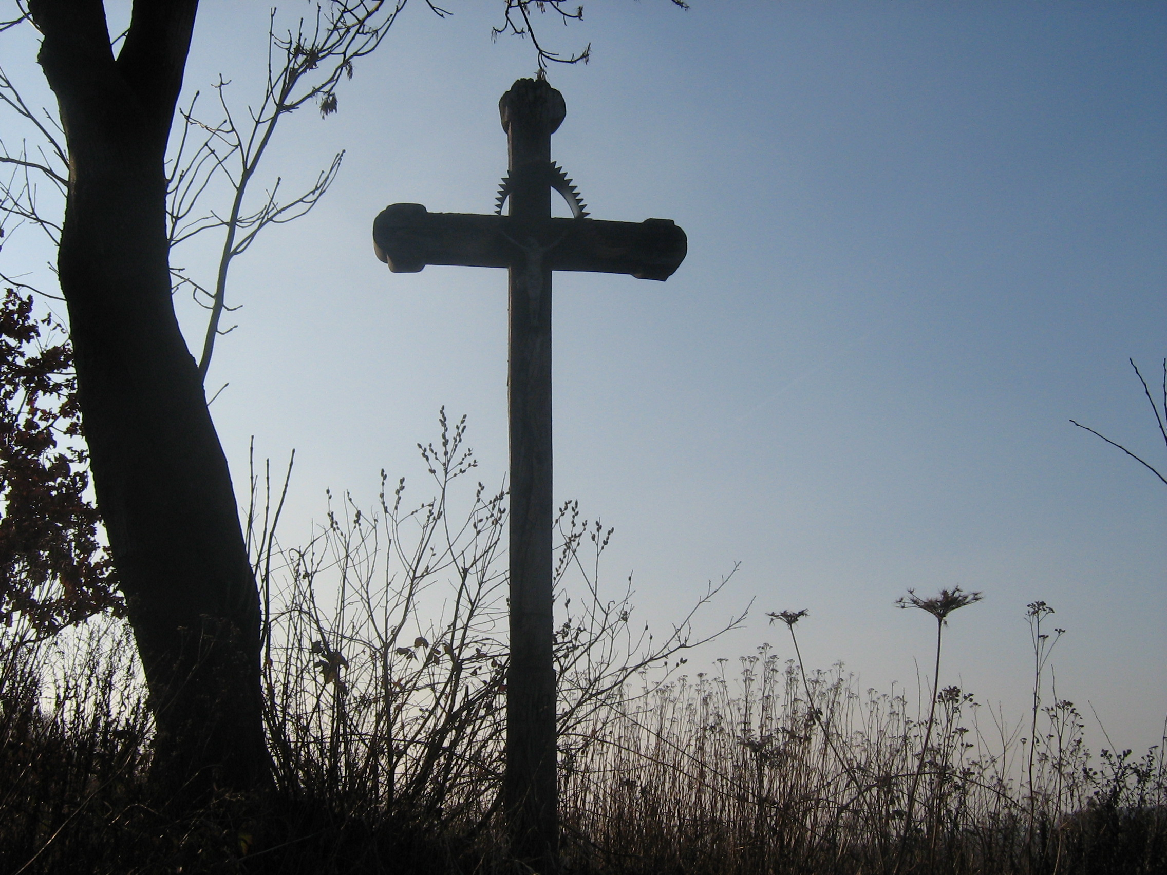 Krzyż z 1948 roku w Bączalu